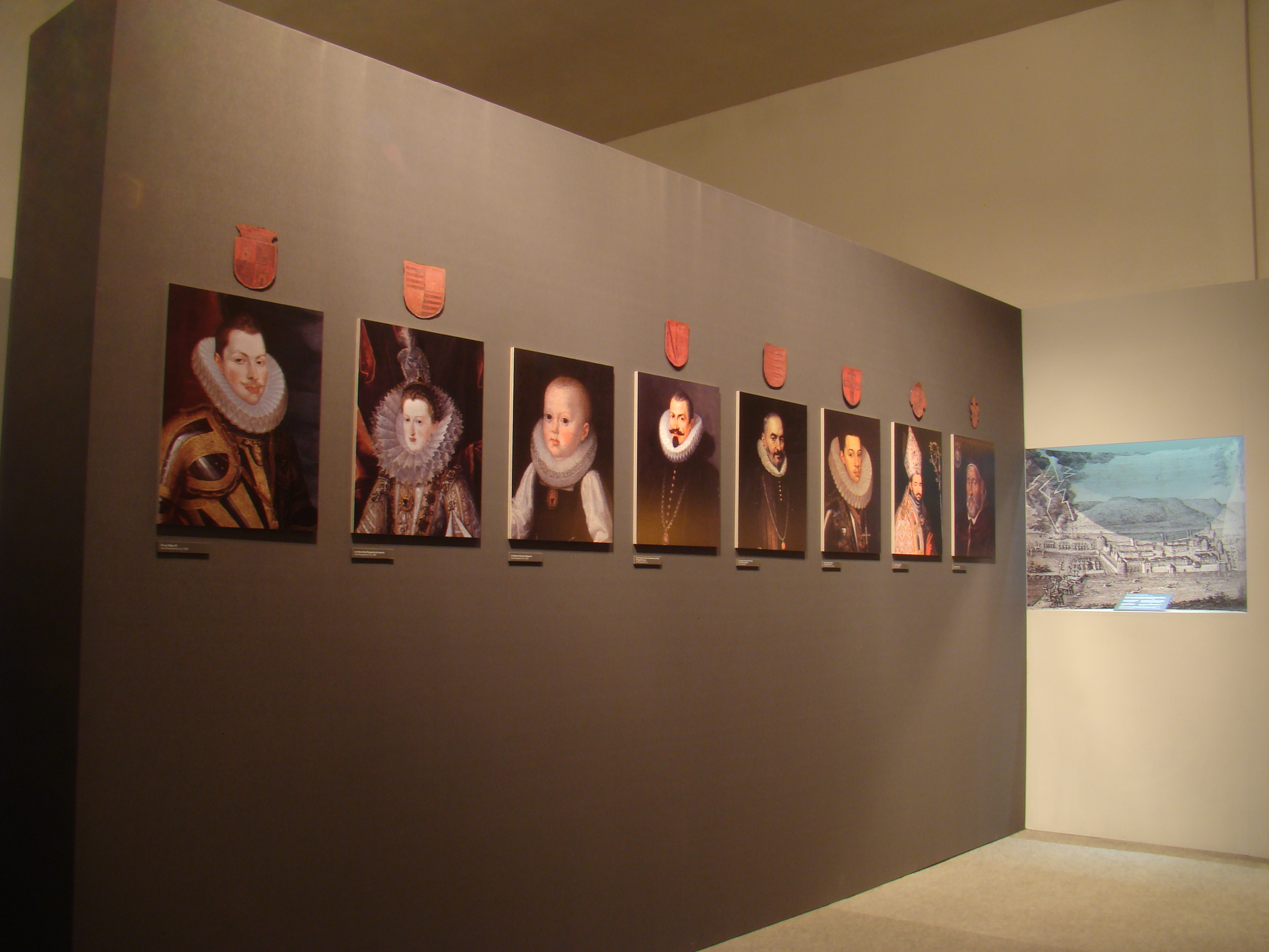 Museo de Valladolid. Exposición temporal del Estandarte de San Mauricio. Retratos de reyes y nobles protagonistas en la gran procesión del estandarte. De izquierda a derecha: El rey de España Felipe III. Pintor:Juan Pantoja de la Cruz (1605) La reina Margarita de Austria. Pintor: Juan Pantoja de la Cruz (1606) Infanta Ana Mauricia, hija de los anteriores. Pintor:Juan Pantoja de la Cruz (1602) Duque de Lerma. Pintor:Juan Pantoja de la Cruz (1602) Conde de Gondomar. Pintor Janos Privitzer (1620) Felipe Manuel (1586-1605), hijo primogénito de Carlos Manuel I de Saboya Obispo de Valladolid Juan Bautista Acebedo. Pintor: López Blanco Papa Clemente VIII